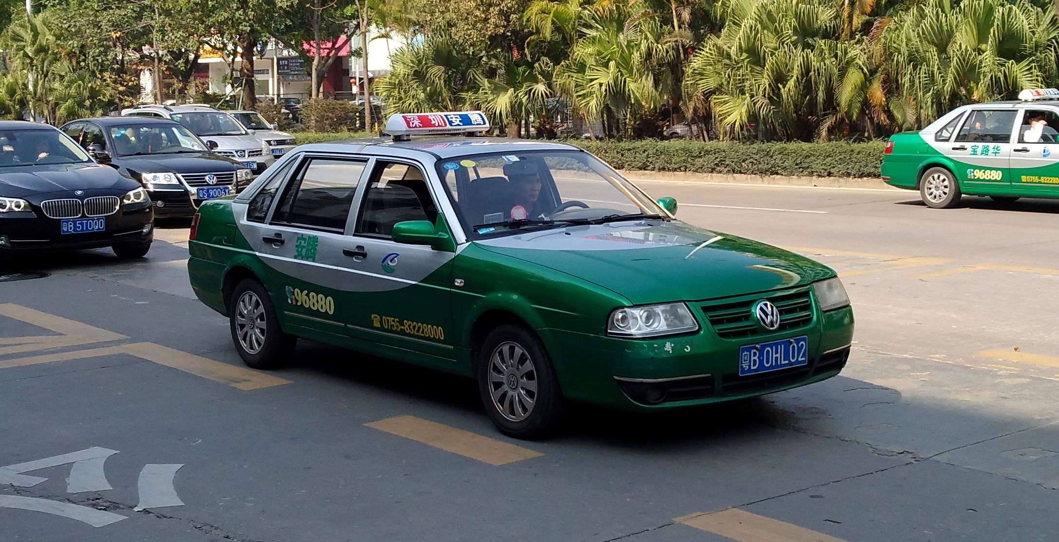 深圳出租车 绿色的士 大众桑塔纳志俊